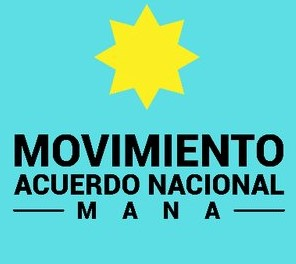 Logo del Movimiento Acuerdo Nacional